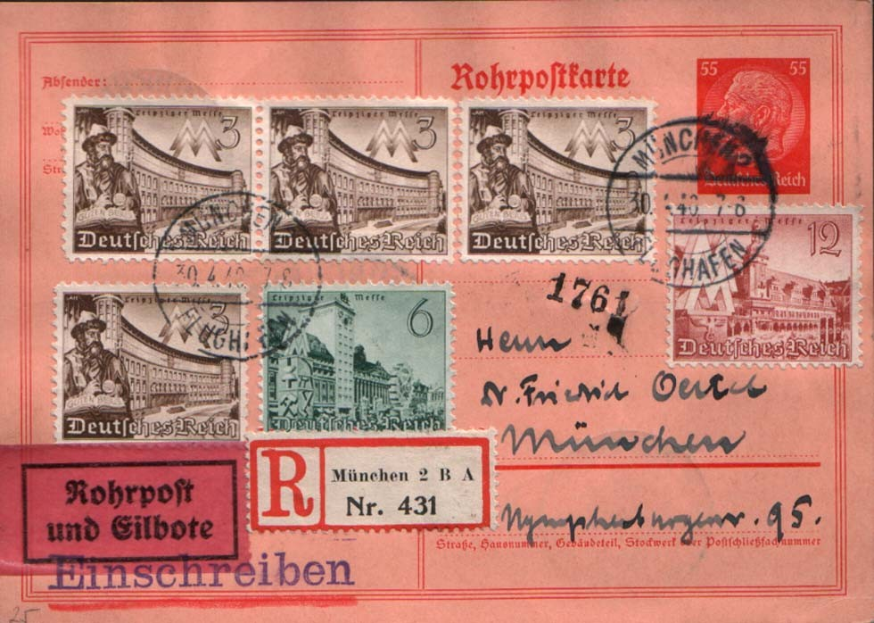 Rohrpostganzsachenkarte mit dem Wertstempel 55 Rpf Hindenburg-Medaillon im Jahre 1940 als Rohrpost-Einschreiben-Eilboten-Ortspostkarte verwendet.